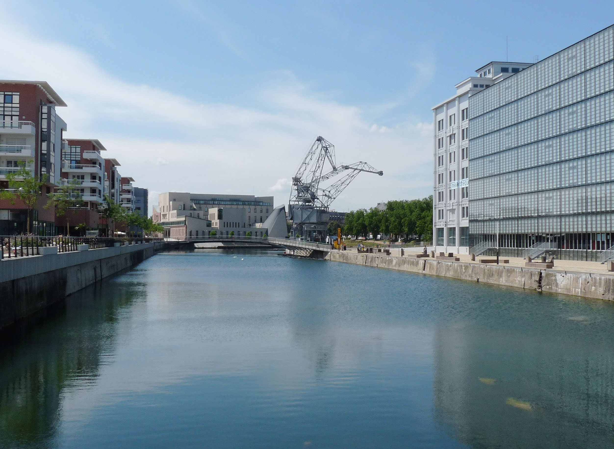 Nouveau quartier de Strasbourg, les Fronts du Neudorf. De gauche à droite : centre commercial Rivétoile, logements, Cité de la musique et de la danse et médiathèque André Malraux